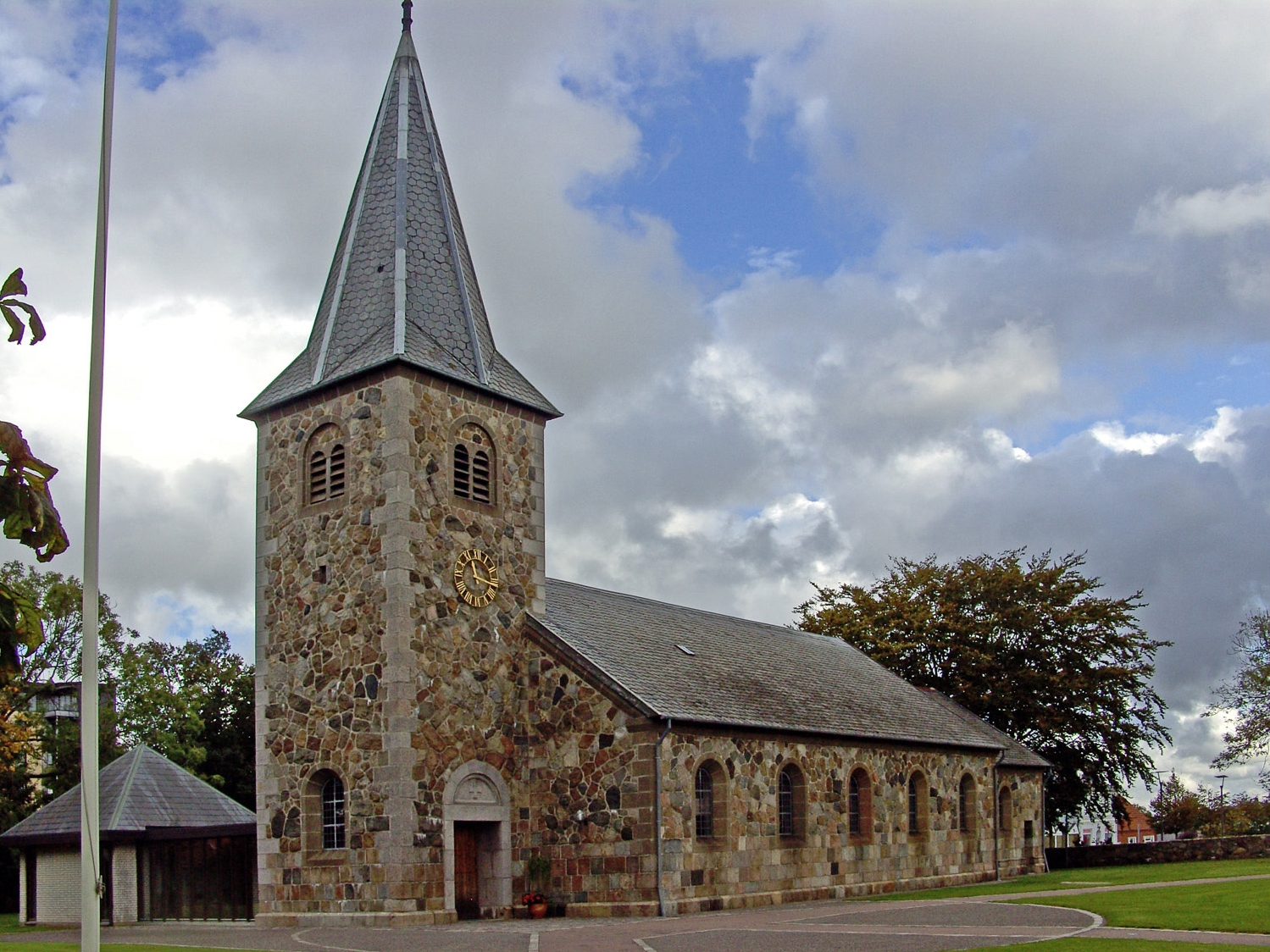 fra sydvest